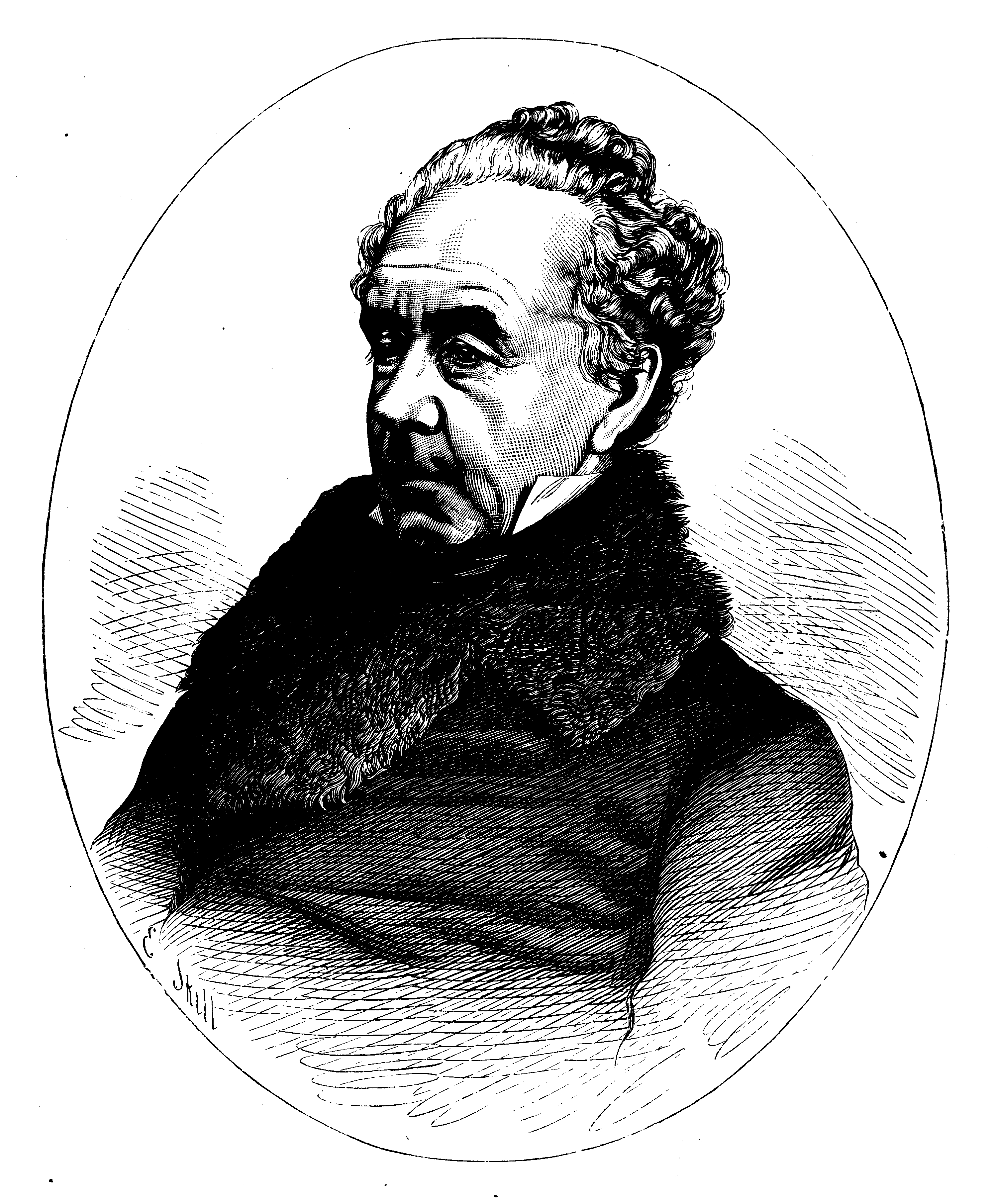 Carl Fredrik Liljevalch, 1796-1870